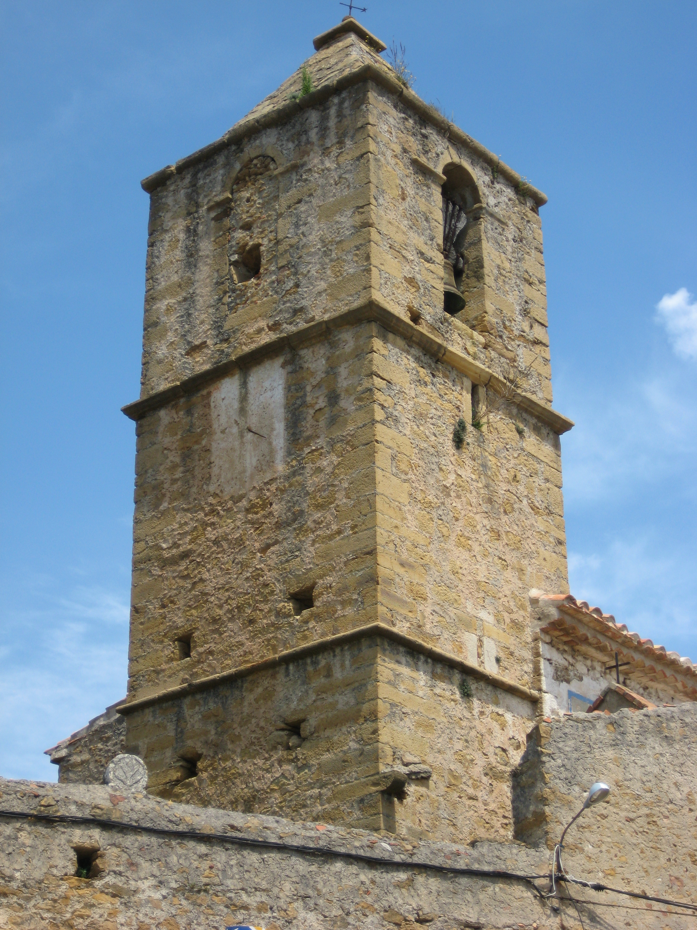 Campanar de l'església de Sant Jaume de Bel (Rossell, Baix Maestrat)